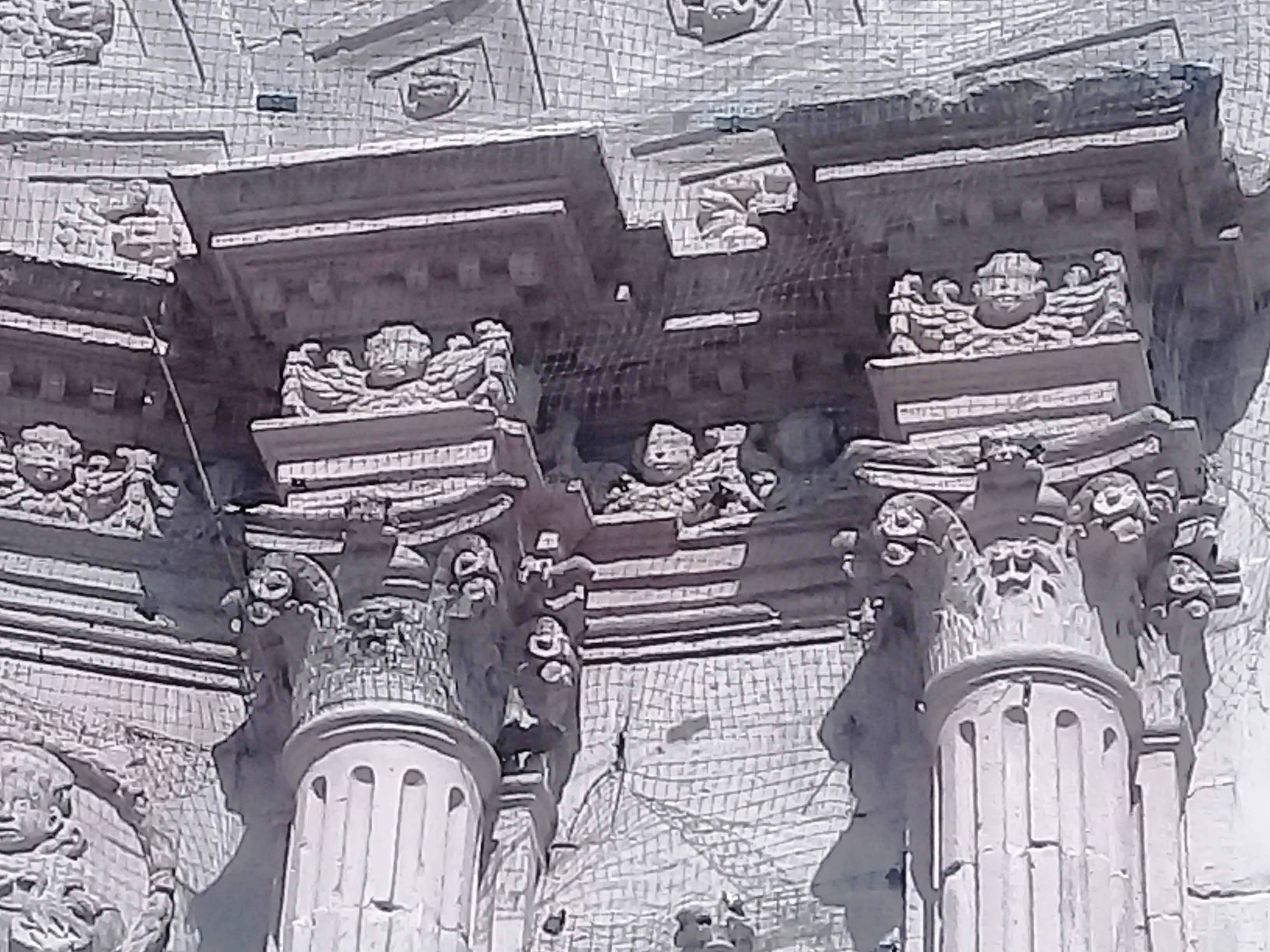 Templo y exconvento de San Nicolás de Tolentino (Actopan).